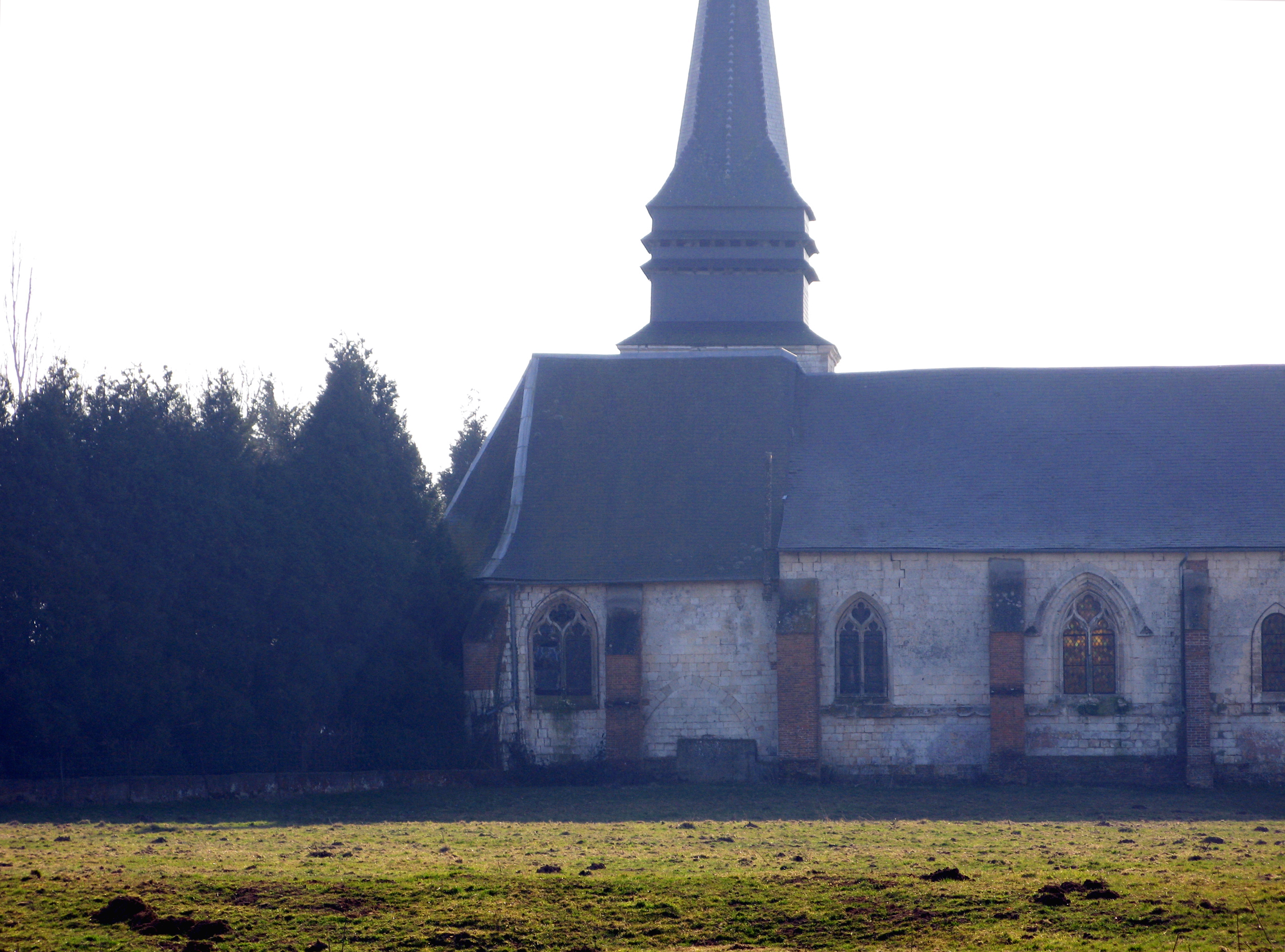 Lignières-Châtelain (Somme, France) - Façade Nord de l'église.